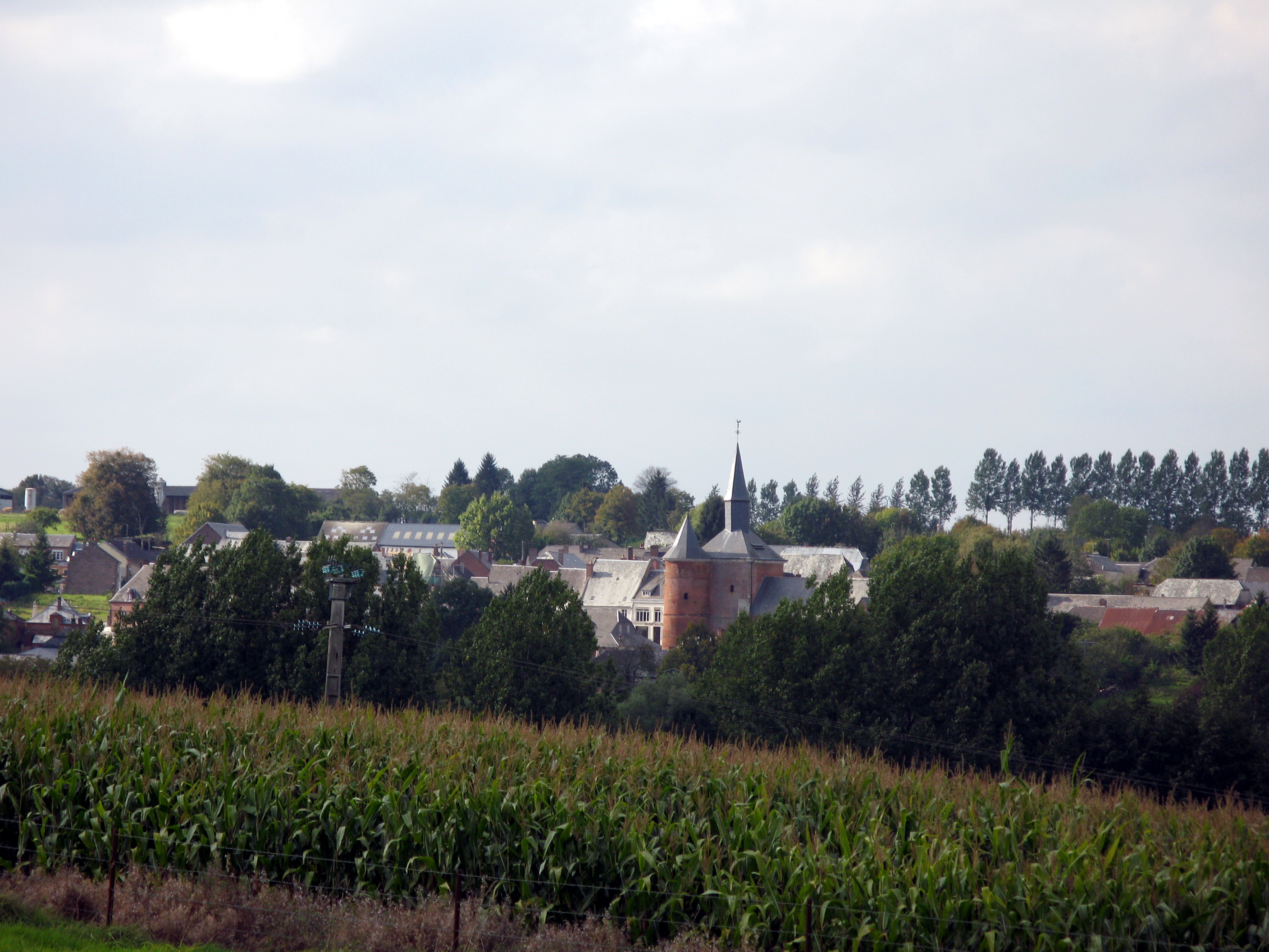 Plomion (Aisne, France) - Le village dans son cadre verdoyant et avec son église fortifiée. Vue depuis la route venant de Bancigny.